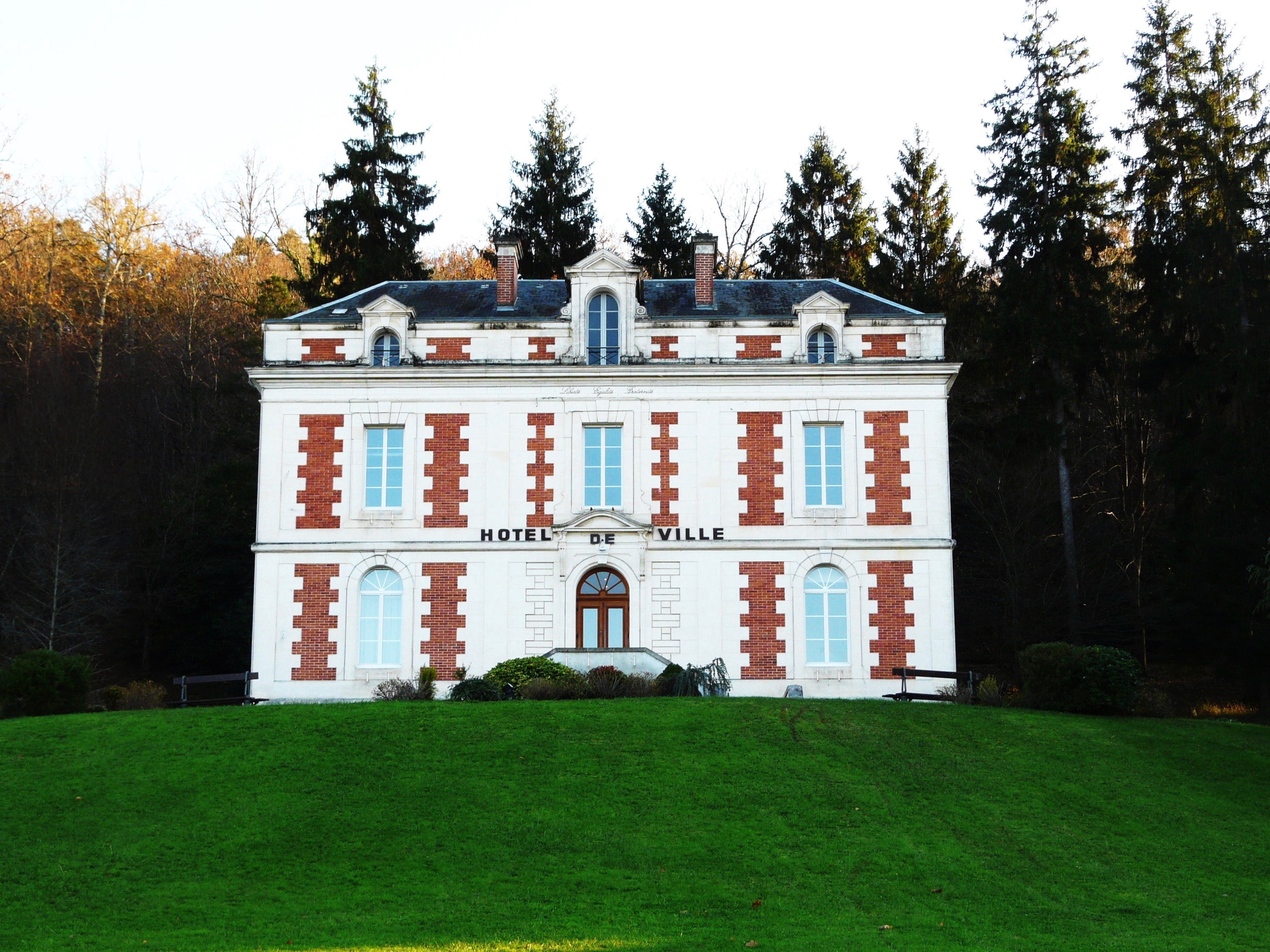 L'hôtel de ville, ancien château des Bernardoux, Marsac-sur-l'Isle, Dordogne, France